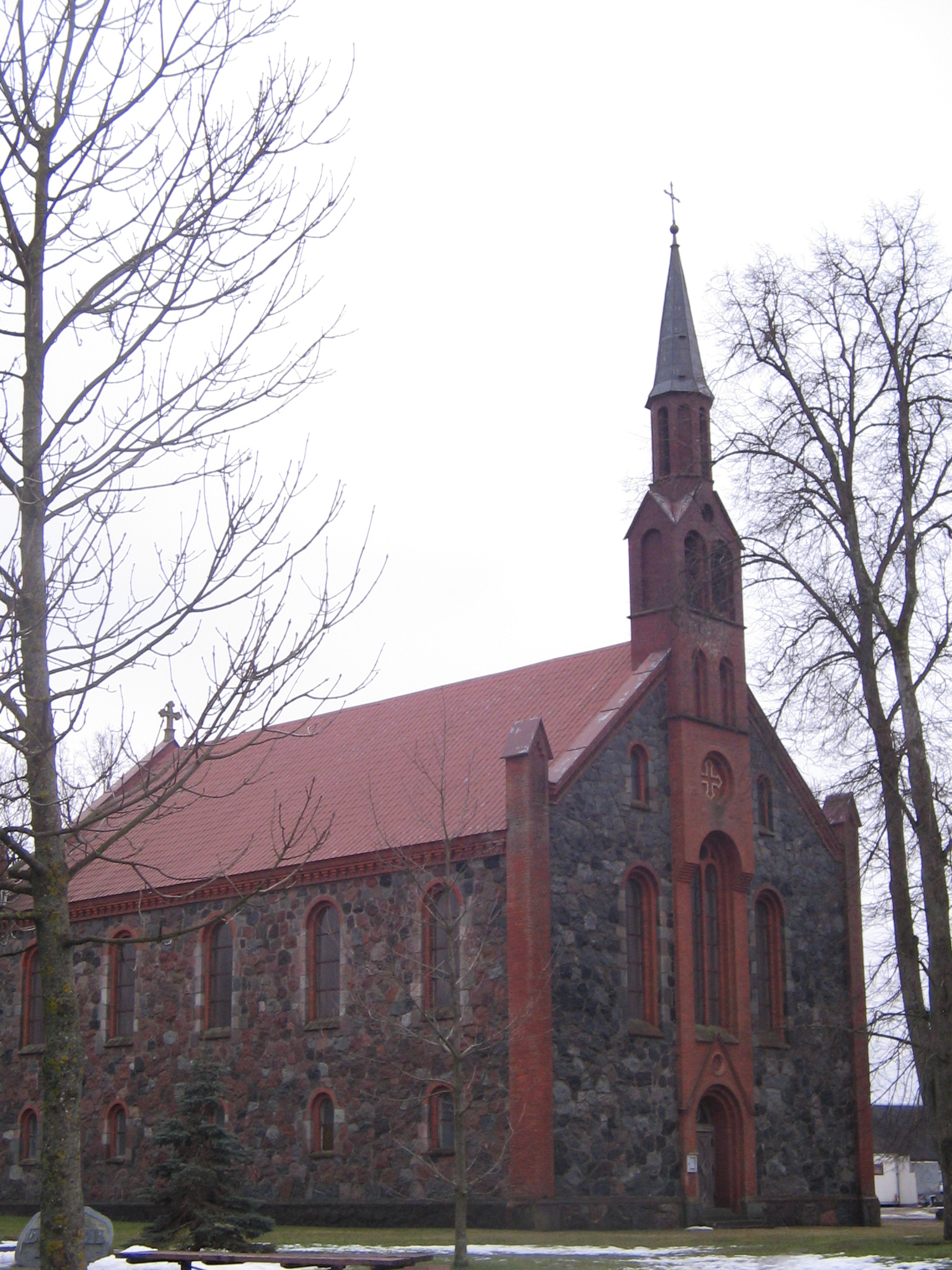 Dovilų evangelikų liuteronų bažnyčia. Aš, Giedrė Armalytė, esu šios fotografijos autorius.